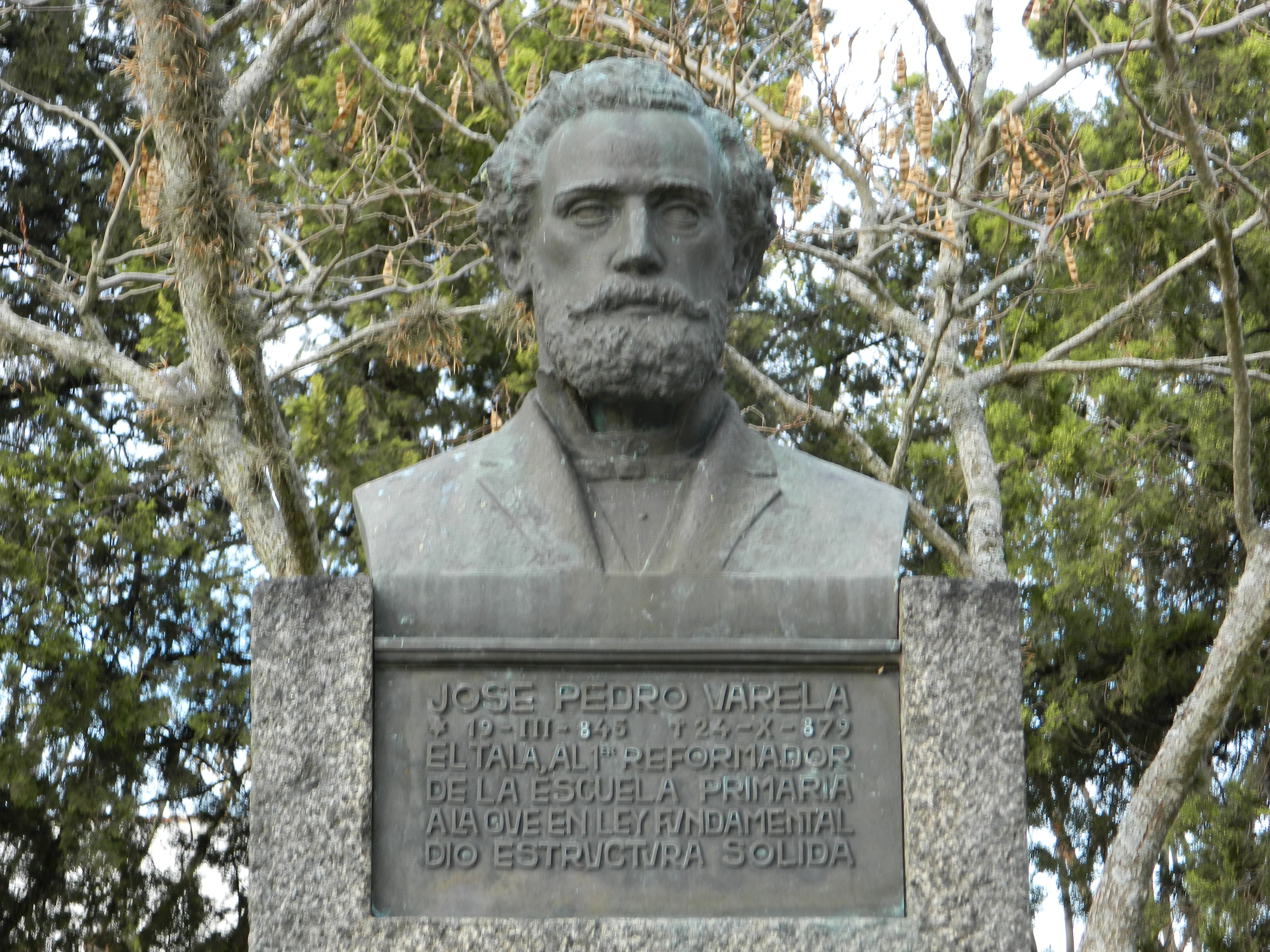 Vista de frente donde se puede apreciar la placa que lleva en su nombre